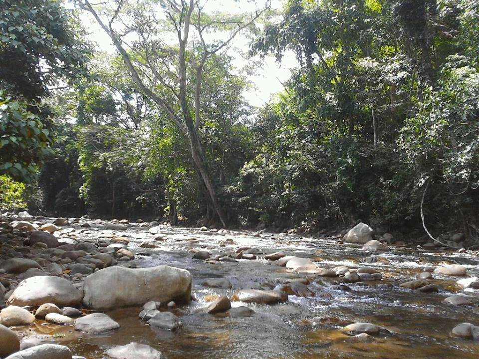 cristalino y frio, el rio llamado el paso del caiman en la sierra de perija